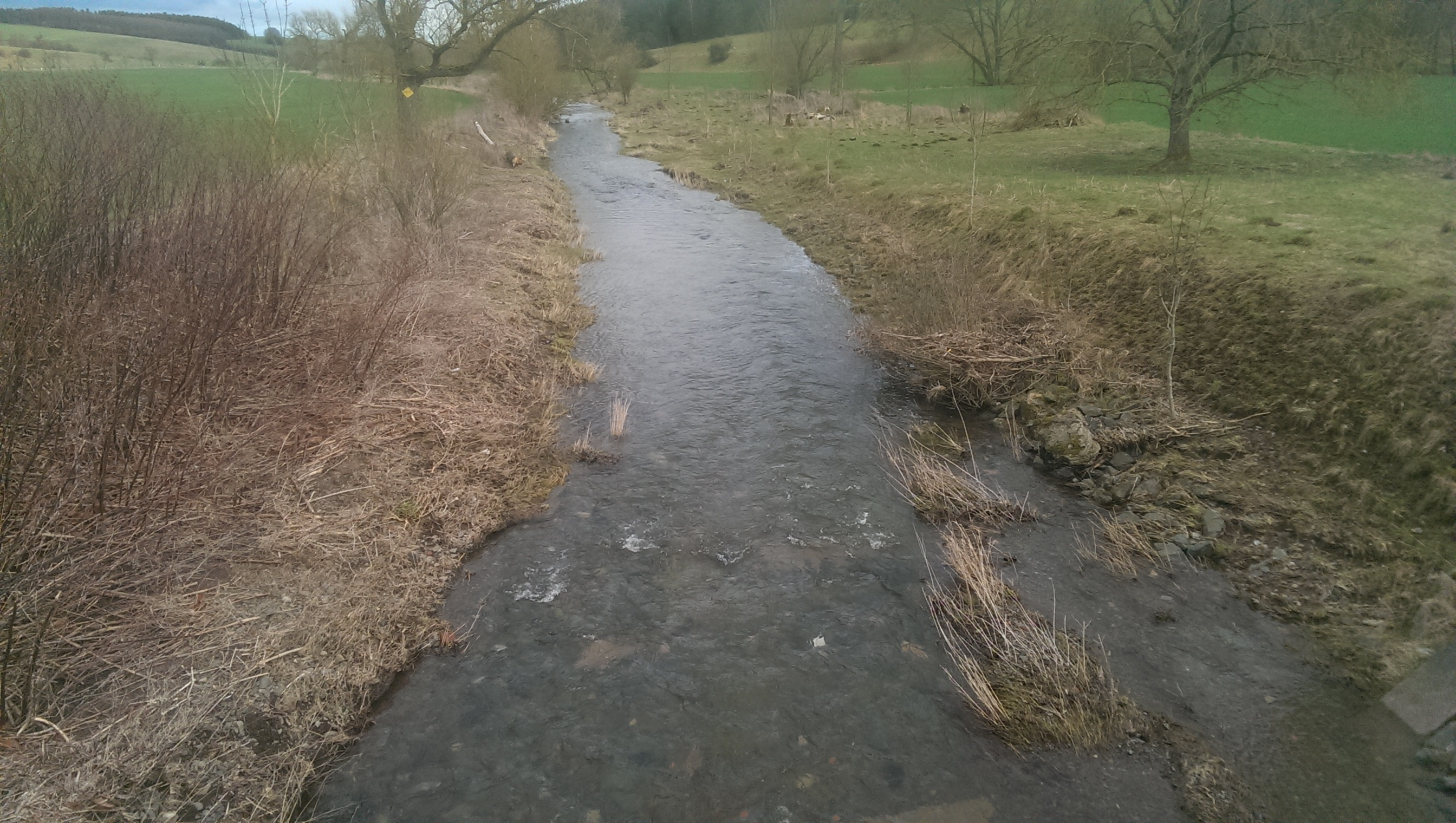 Leider hat das Bild einen Grauen Star, aber ich bemühe mich ein besseres zu machen. Wieda bei Gudersleben.